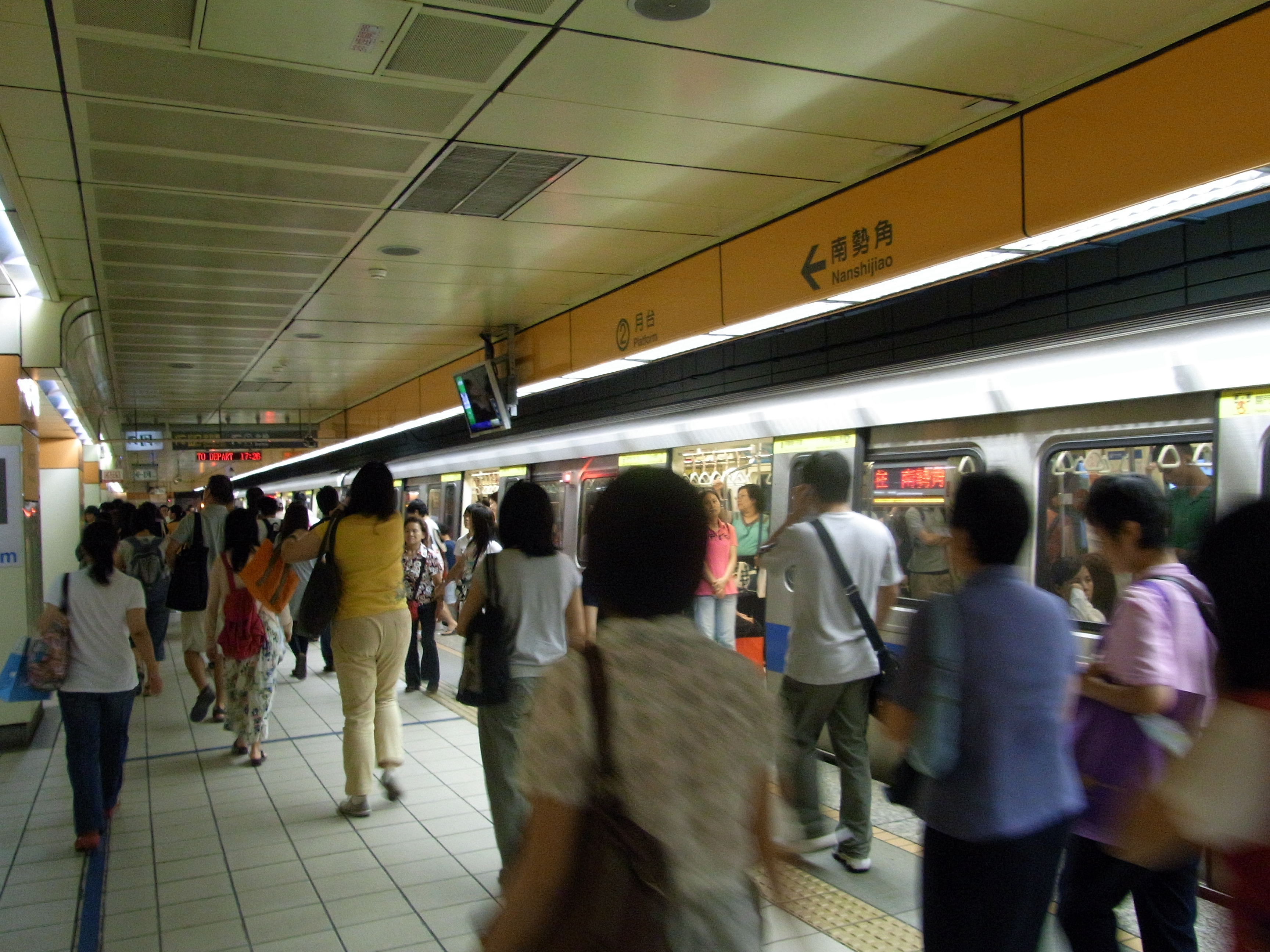 永安市場站月台